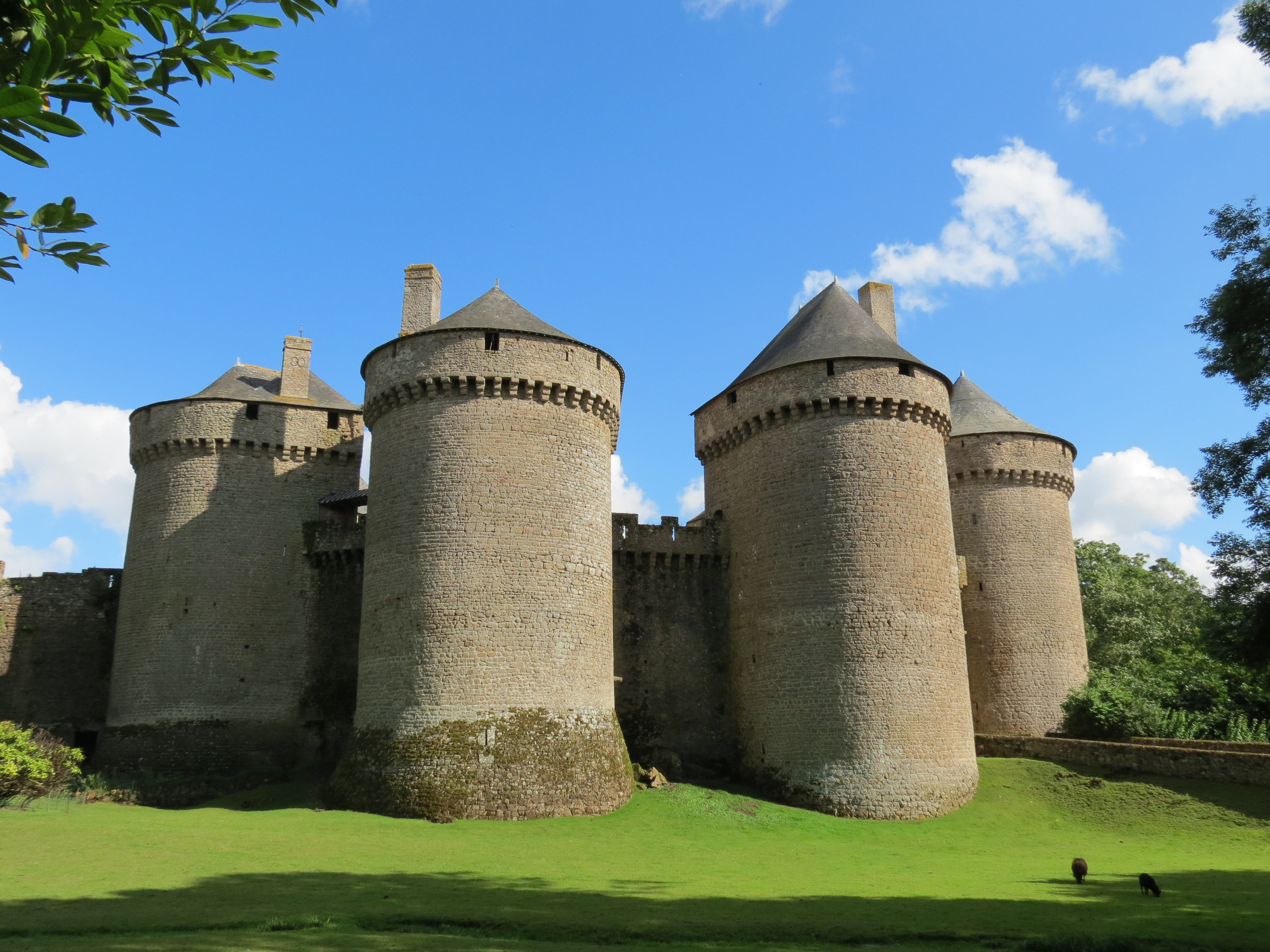 Château de Lassay, dans la Mayenne, Pays de la Loire. Object location48° 26′ 20″ N, 0° 30′ 00″ W